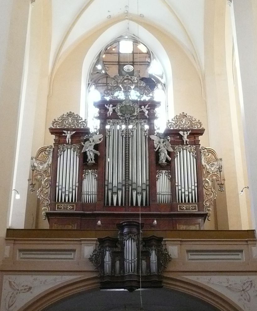 Organy kościoła w Kamieńcu Ząbkowickim Unknown